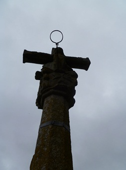 Detalle do cruceiro da costa, capitel.